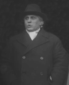 Die ersten großen inoffiziellen Besprechungen in Genf. Die beiden französischen Politiker Loucheur, links, und Paul Boncour, Mitte, mit ihrem Sekretär auf der Seepromenade in Genf, nach einer Besprechung bei Chamberlain.